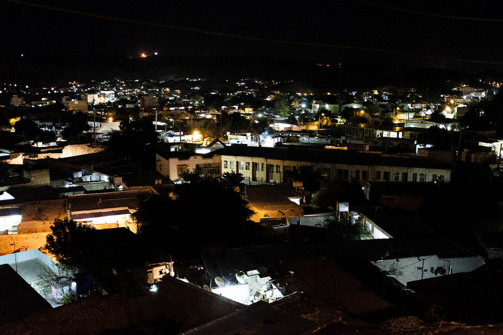 مسجد سلیمان